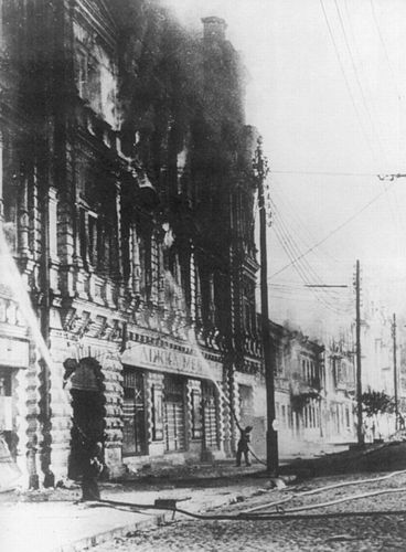 Україна. Київ. Хрещатик. Пожежа в будівлі колишнього готелю "Національний"